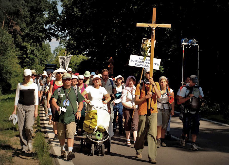 Pielgrzymi Warszawskiej Akademickiej Pielgrzymki Metropolitalnej (WAPM) w czasie drogi.